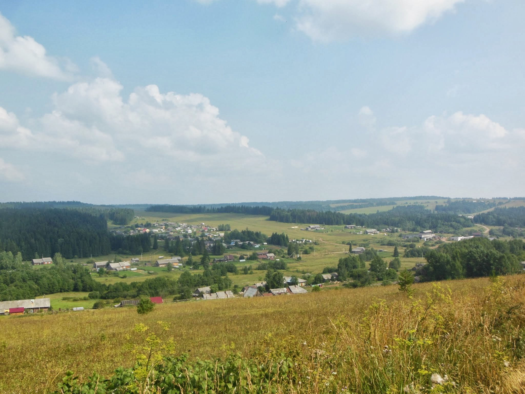 Nytvenskiy r-n, Permskiy kray, Russia